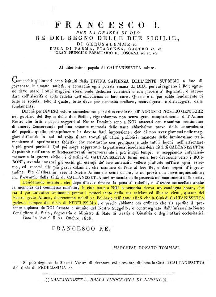 Decreto di concessione del titolo di “Fedelissima” alla città di Caltanissetta da parte di Ferdinando I